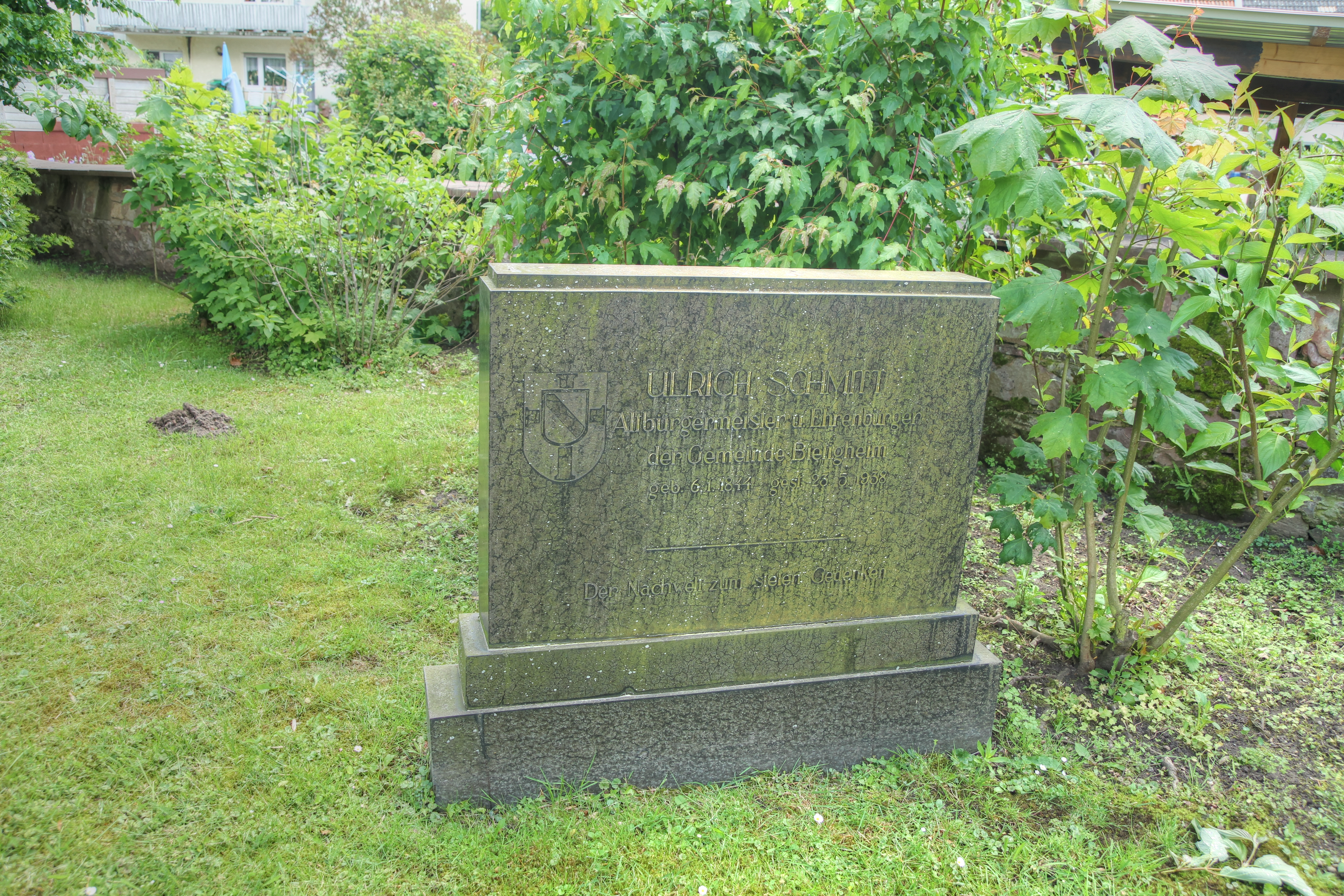 Grabstein im badischen Bietigheim von Altbürgermeister Ulrich Schmitt. Inschrift: Ulrich Schmitt Altbürgermeister und Ehrenbürger der Gemeinde Bietigheim. Geboren 6.01.1844 gestorben 23.05.1938 Der Nachwelt zum steten Gedenken.